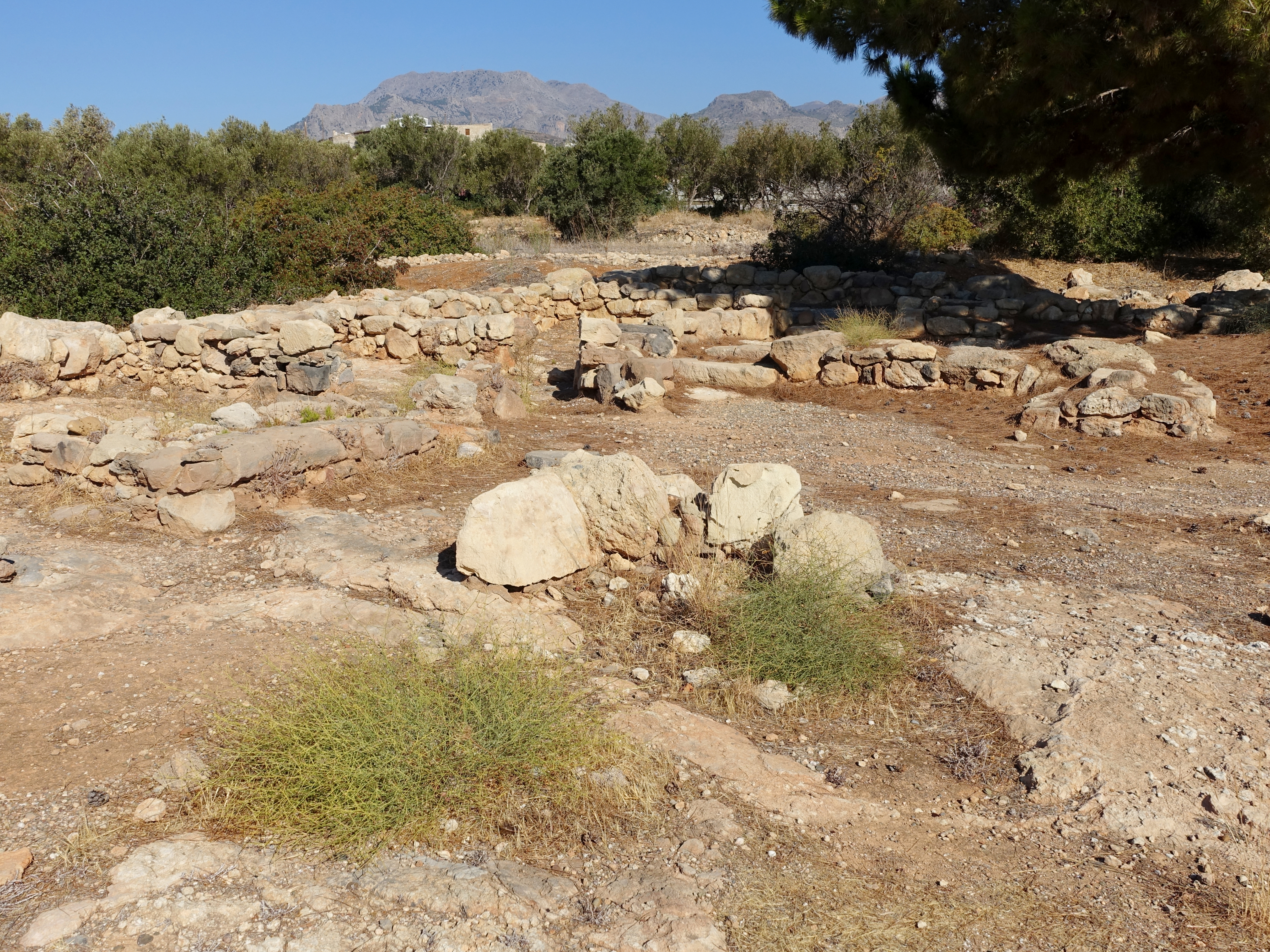 Ausgrabungsstätte der minoischen Villa von Makrygialos, Kreta, Griechenland